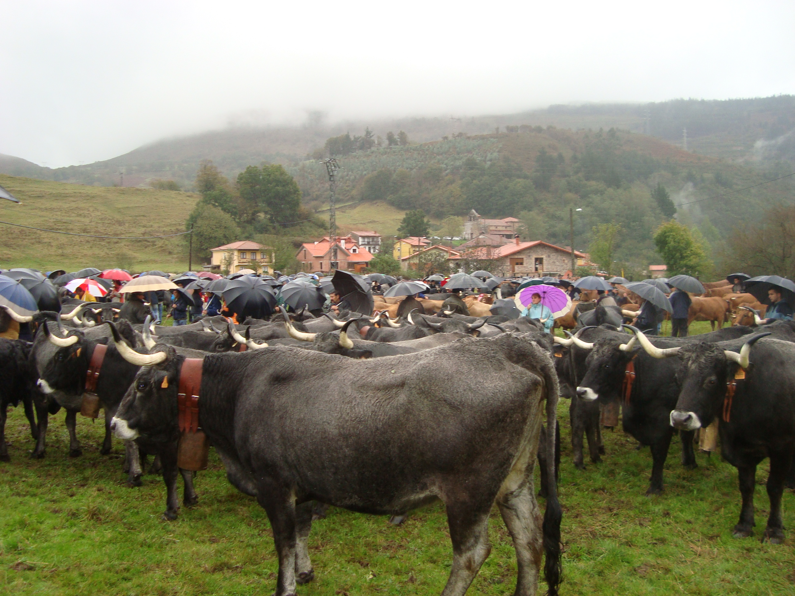 Feria de ganado tudanco en Cieza (Cantabria, España).